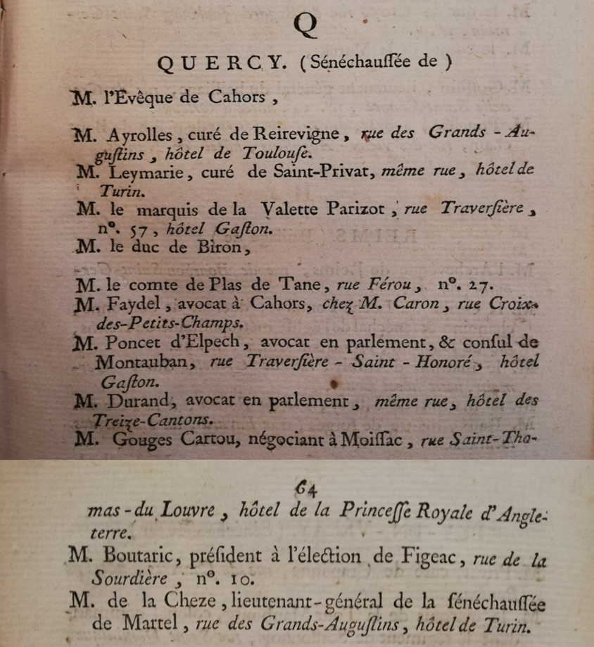 Montage des pages 64 et 65 de la liste des députés, imprimée chez Baudoin, imprimeur de l'Assemblée nationale, Paris 1789